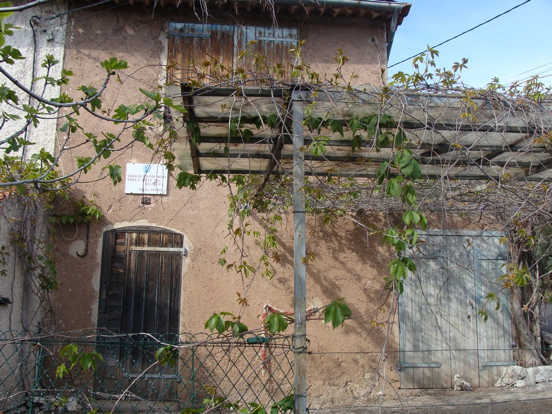 La Bastide neuve de Marcel Pagnol, près de La Treille